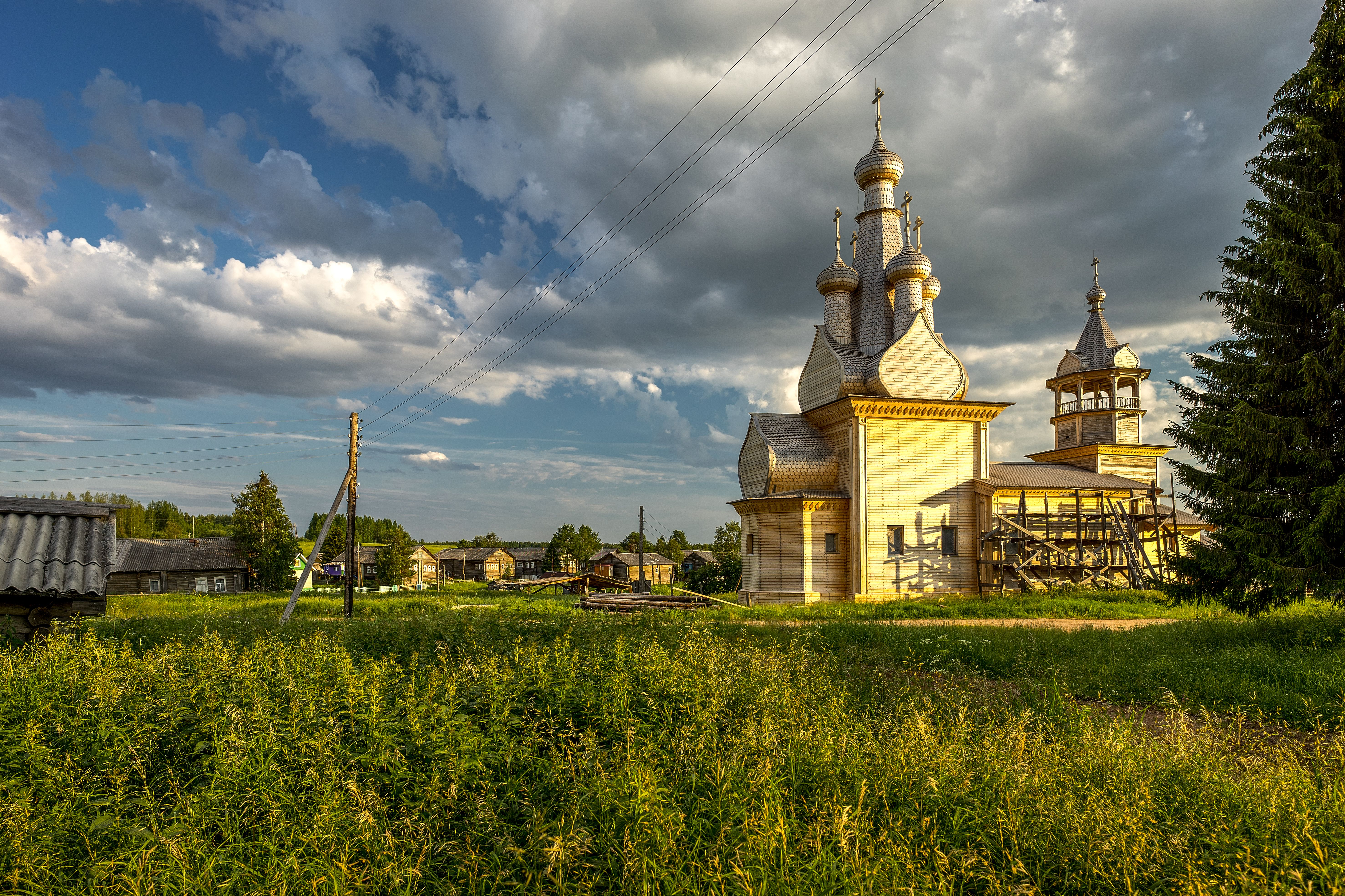 Церковь Одигитрии (Смоленская (Одигитриевская)): Кимжа, Мезенский район, Архангельская область